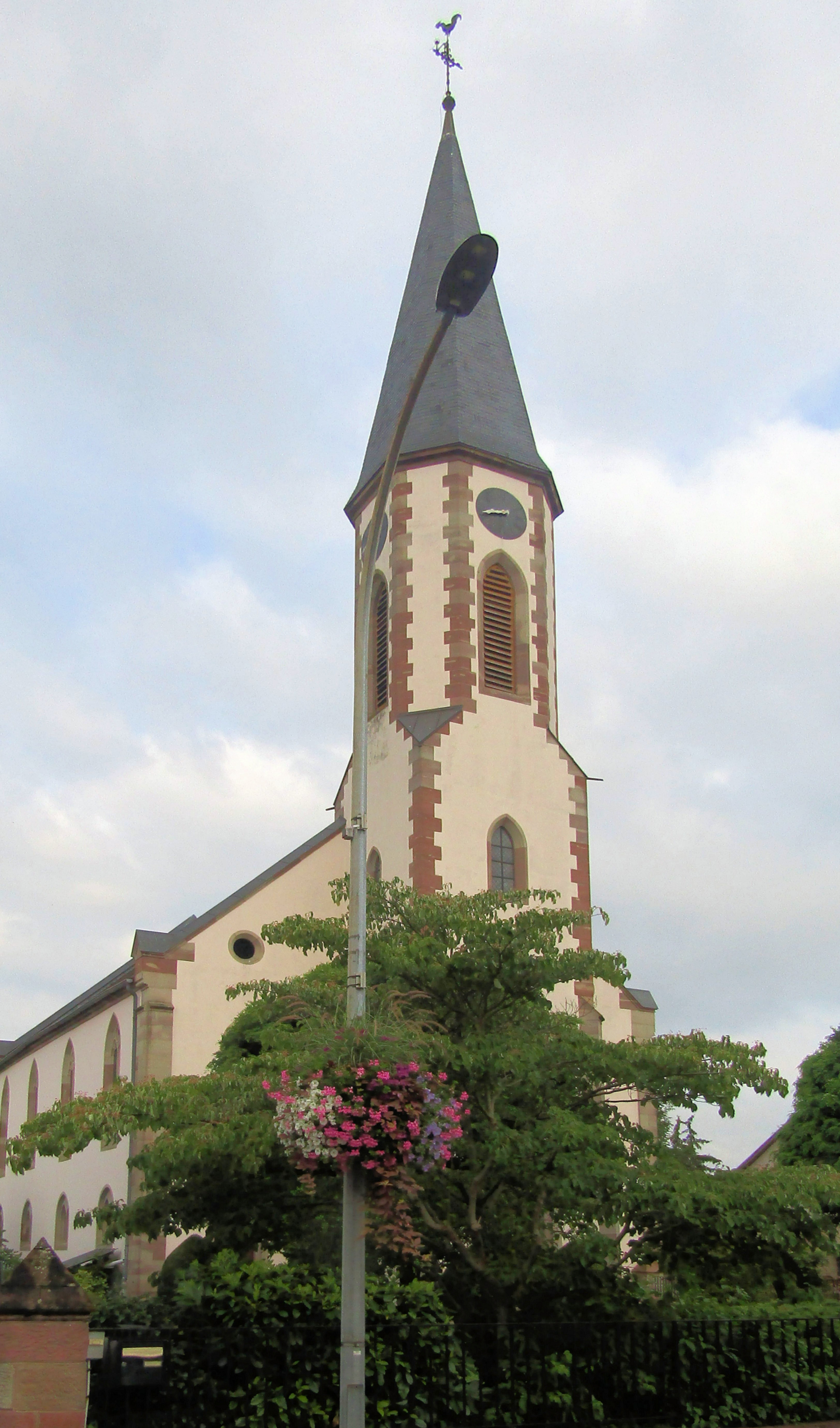 Temple Saint-Guillaume à Gerstheim